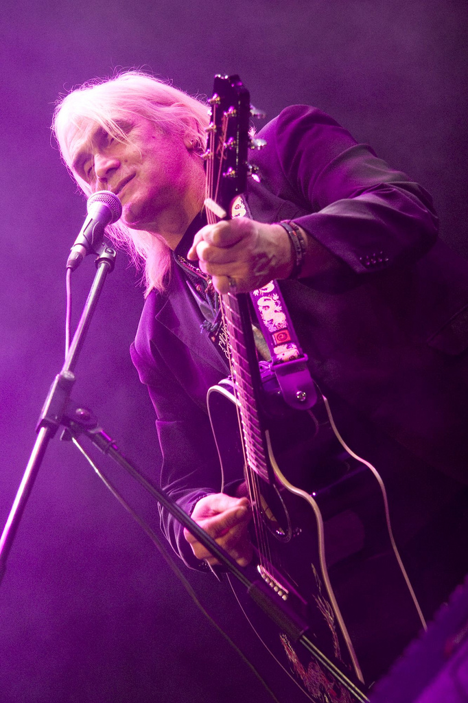 Arena ; riblja ccorba ; koncert. Foto: Dussko jelen 31-10-09